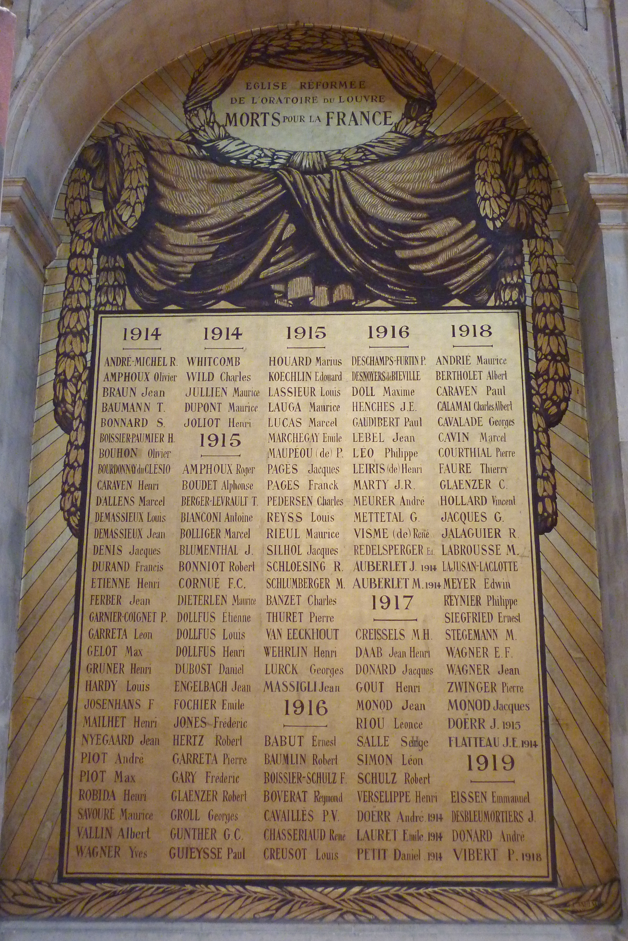 Denkmal für die Gefallenen des Ersten Weltkriegs im Oratoire du Louvre in Paris